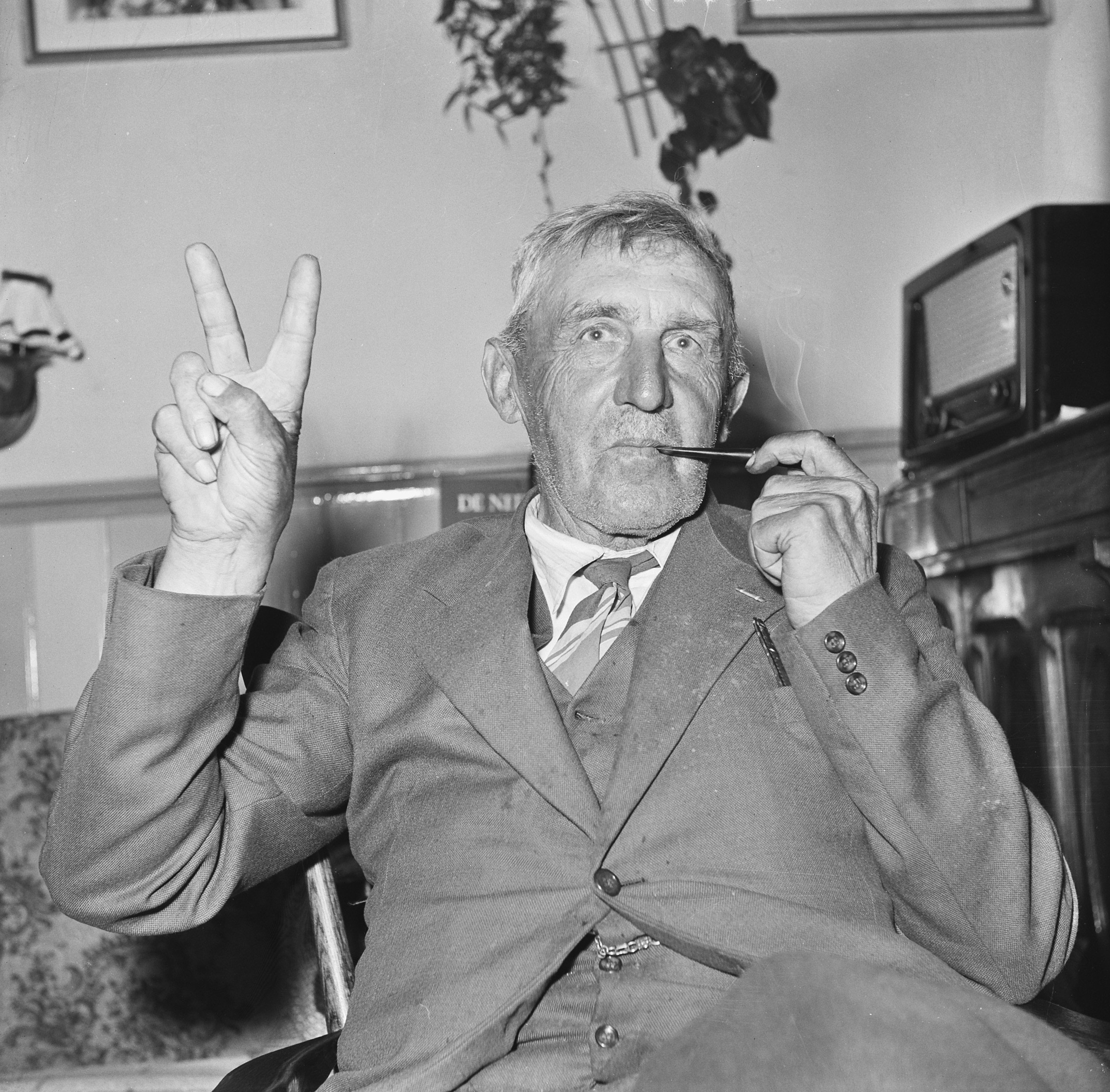 Collectie / Archief : Fotocollectie Anefo Reportage / Serie : [ onbekend ] Beschrijving : H. J. Colsen uit Sluiskil (Zeeuws-Vlaanderen) leider comité Vrij Varen Datum : 11 juni 1958 Locatie : Sluiskil, Zeeland Trefwoorden : Comites, leiders Persoonsnaam : H. J. Colsen Fotograaf : Slagboom, […] / Anefo Auteursrechthebbende : Nationaal Archief Materiaalsoort : Negatief (zwart/wit) Nummer archiefinventaris : bekijk toegang 2.24.01.03 Bestanddeelnummer : 909-6269